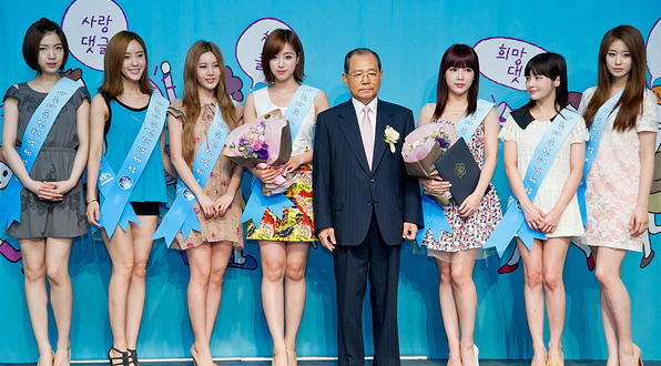 2012년 6월 11일 서울 프레스센터 국제회의장에서 열린 2012 아름다운 인터넷 세상 만들기 캠페인 선포식에 홍보대사로서 참석한 티아라